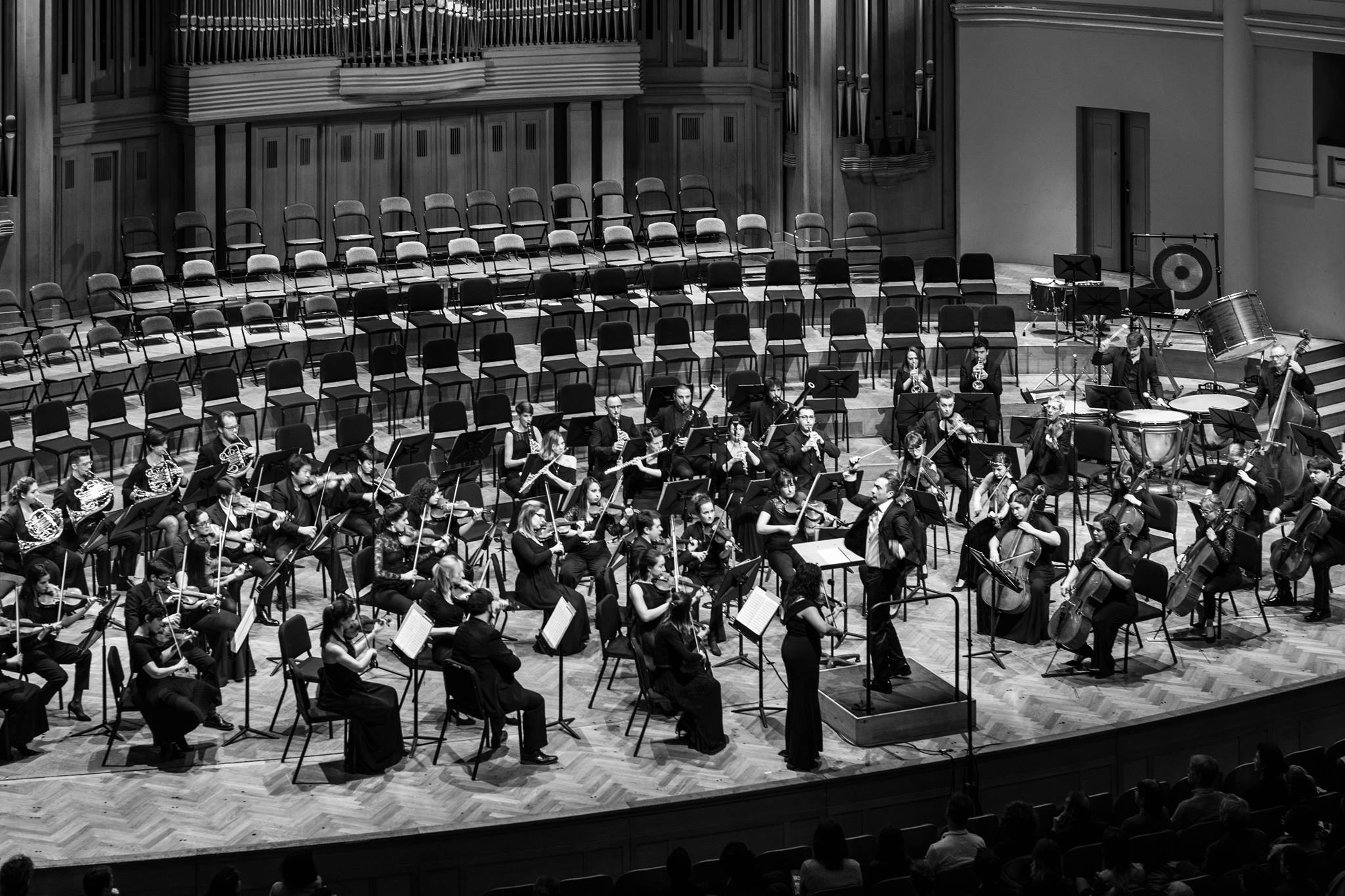 Concert "Dona Nobis Pacem", Max Bruch, Arnold Schoenberg, Ralph Vaughn Williams